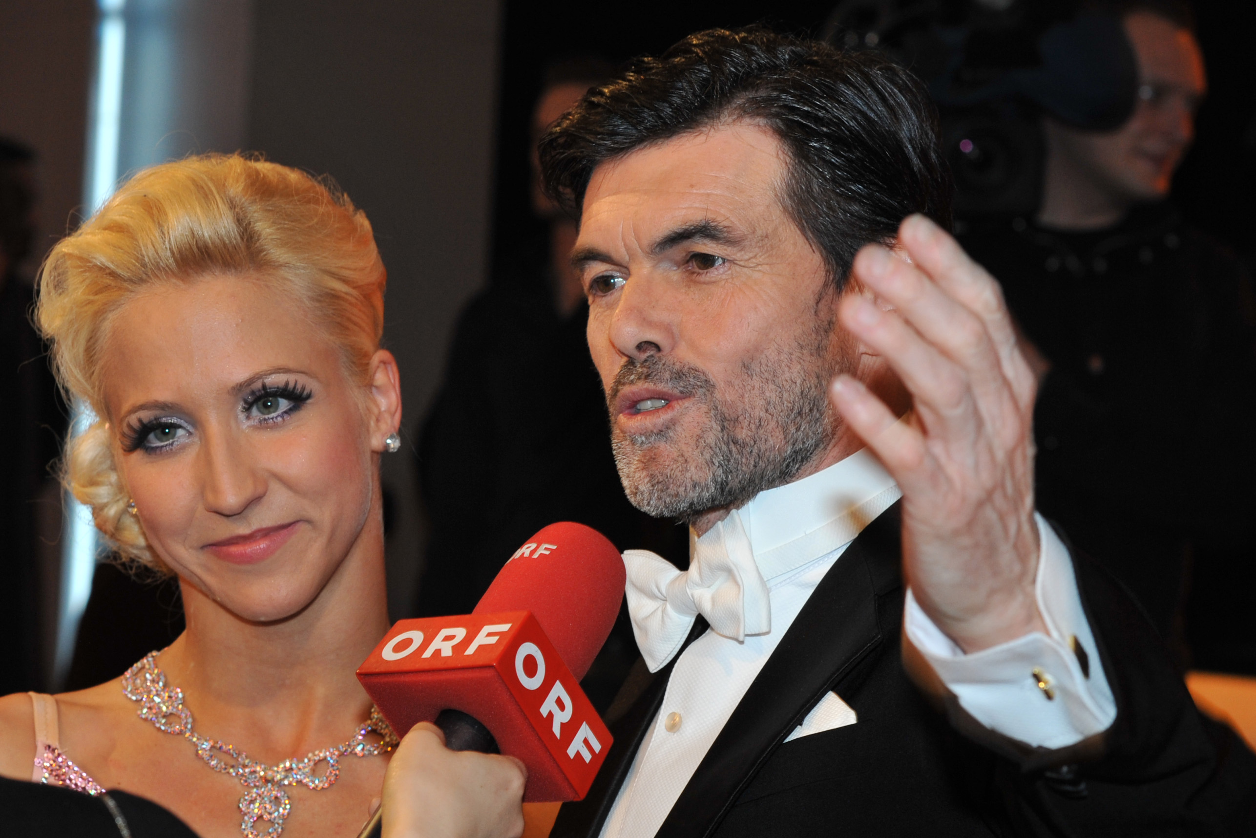 "Dancing Stars" am 7. März 2014: Kathrin Menzinger und Hubert Neuper